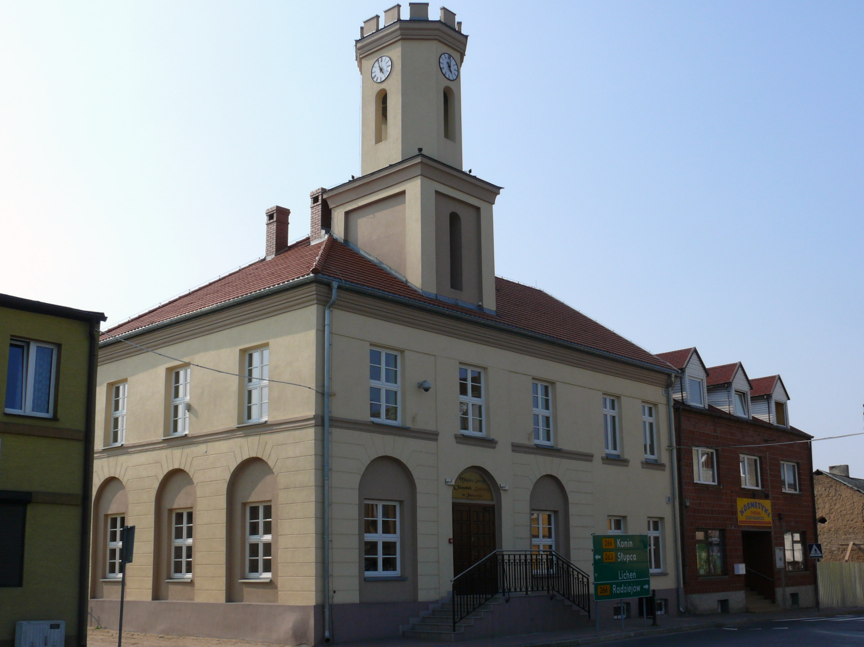 ratusz w Sompolnie